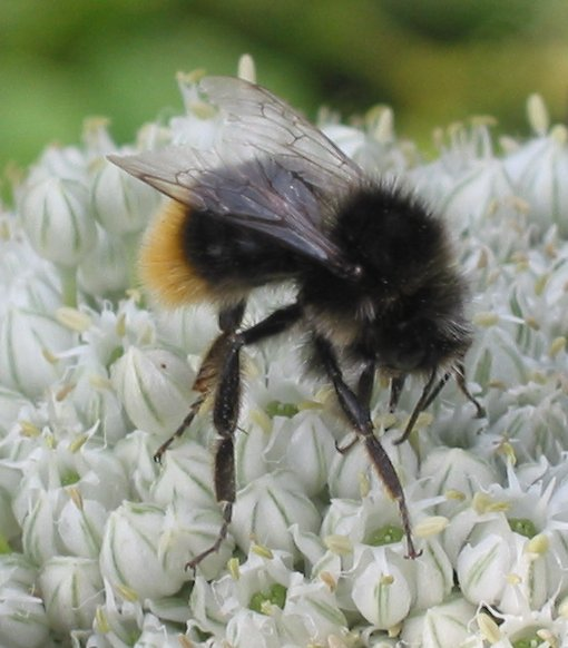 zelfgemaakte foto van Grashommel op prei; half juli